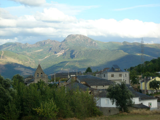 Foto de Campañana